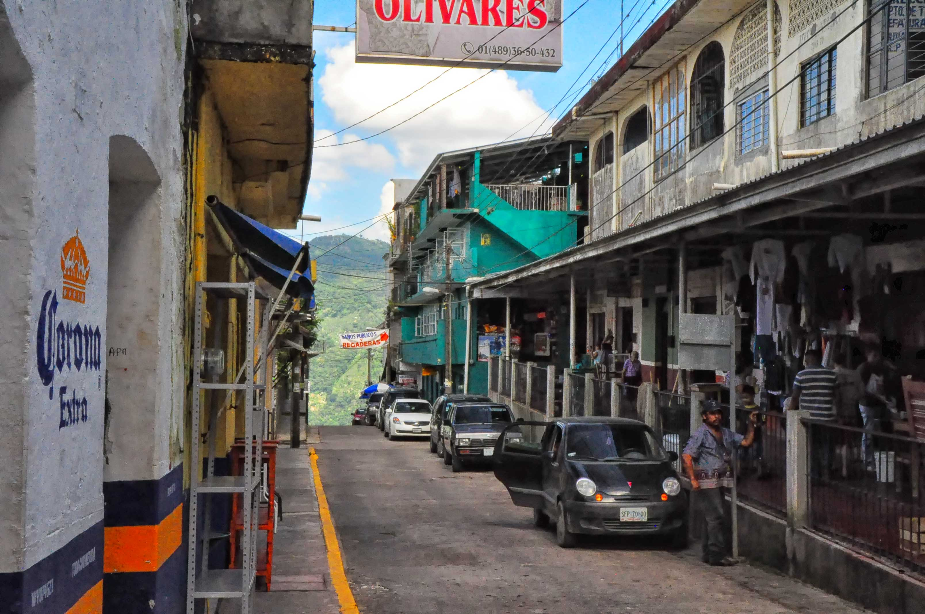 Xilitla, Mexico